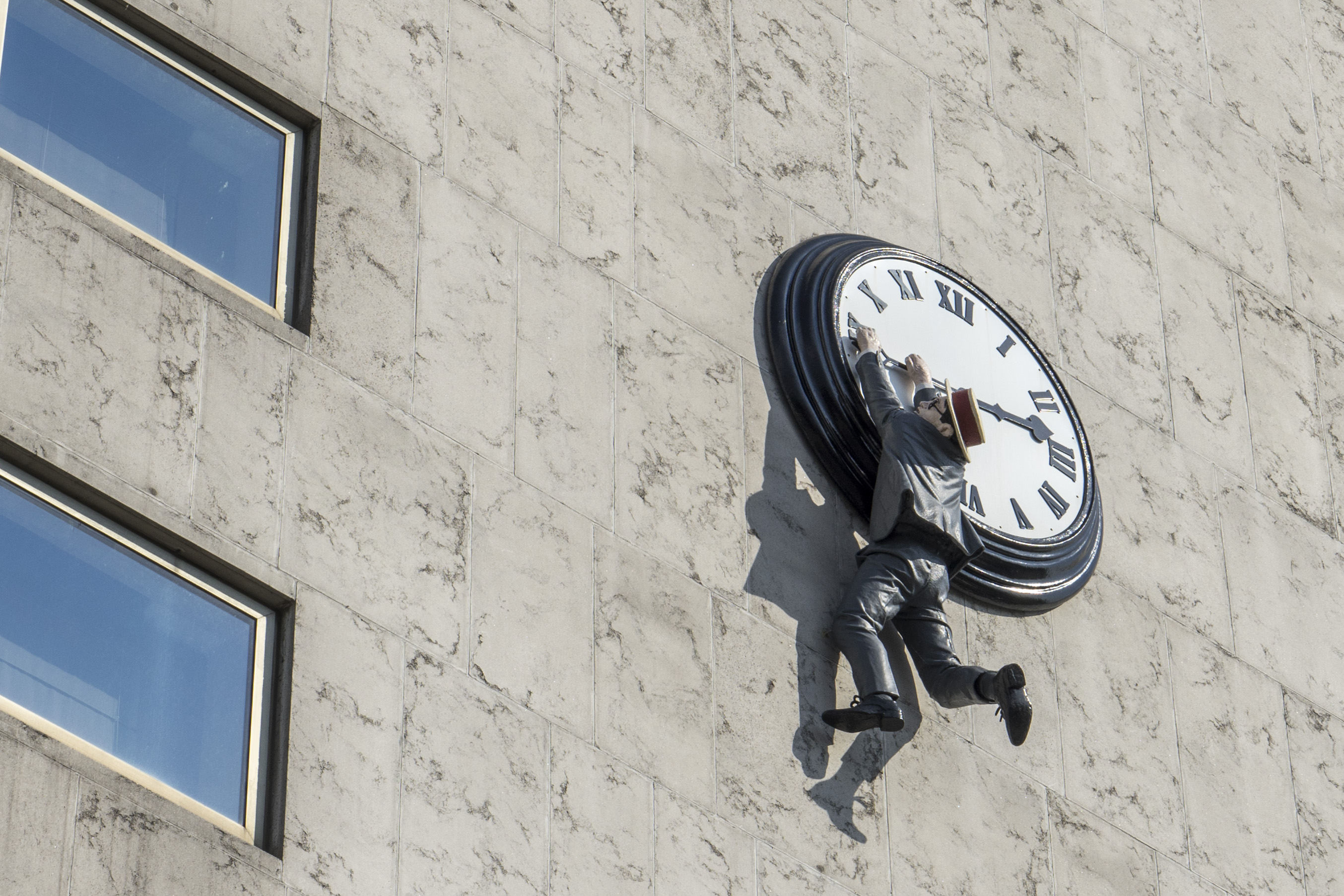 Intercontintental, Sign of the times, Wien. Skulptur Steinbrener / Dempf & Huber für die Viennale Darstellung von Harold Lloyd / Safety Last / 1923